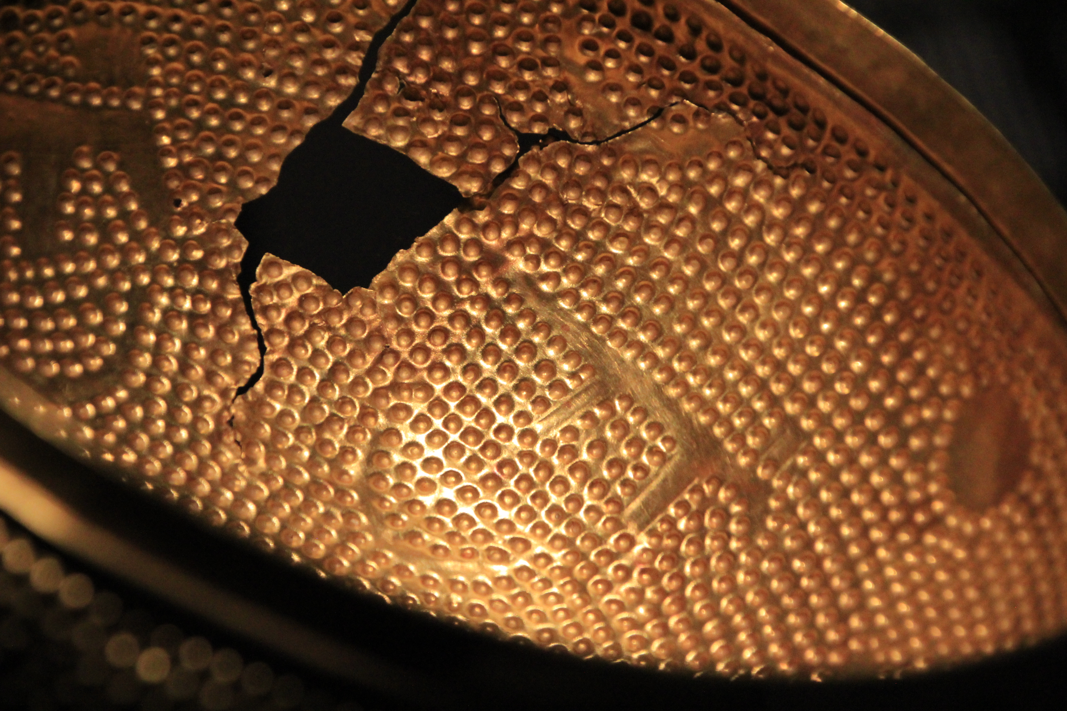 Detail Goldschale von Altstetten, Landesmuseum Zürich